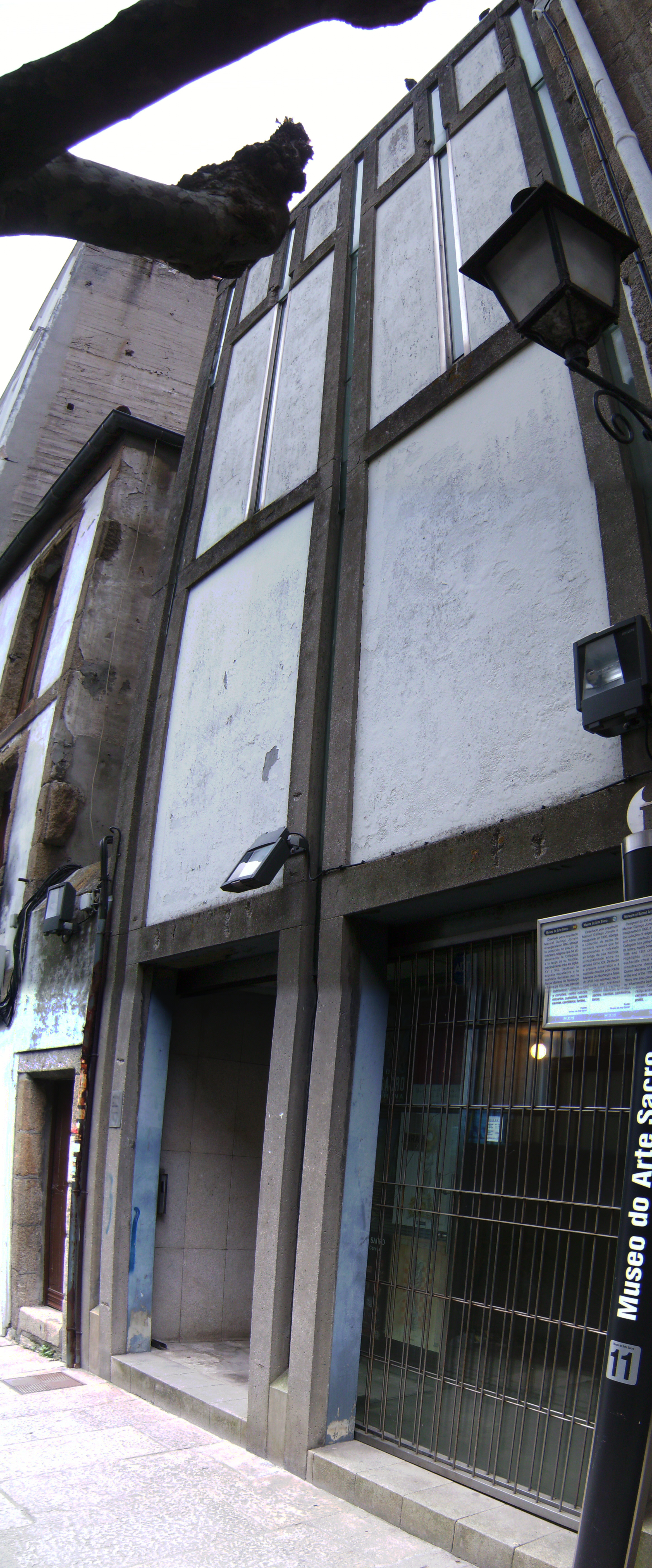 Museo de Arte Sacro da Colexiata na Coruña.